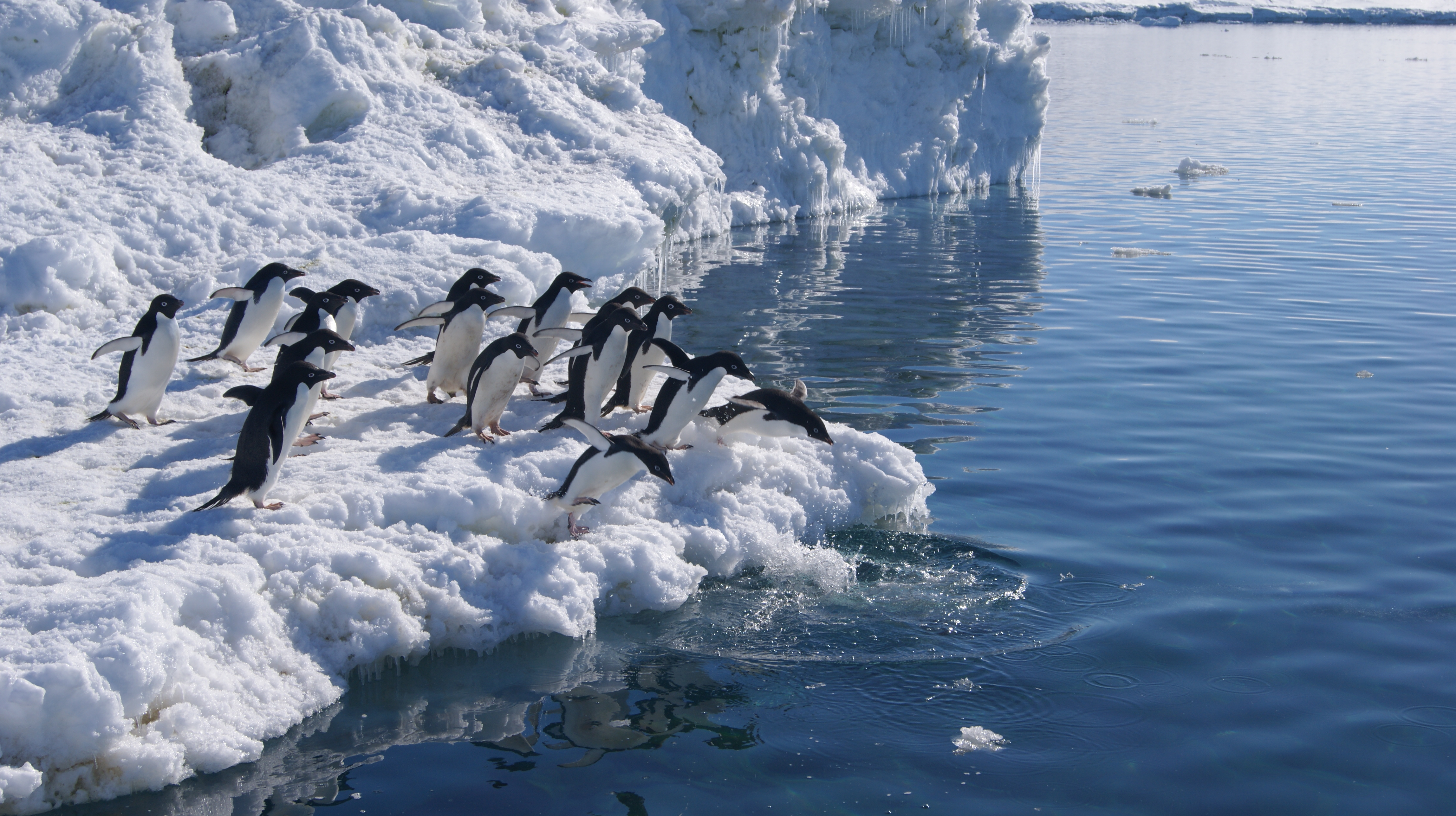 Tous à l'eau, Anse du Lion. Base Dumont d'Urville, Terre Adélie.